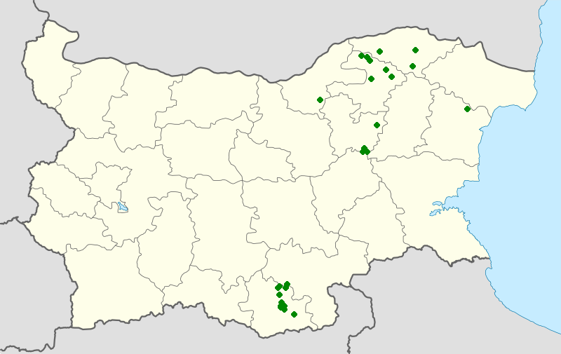 Алевийски села в България